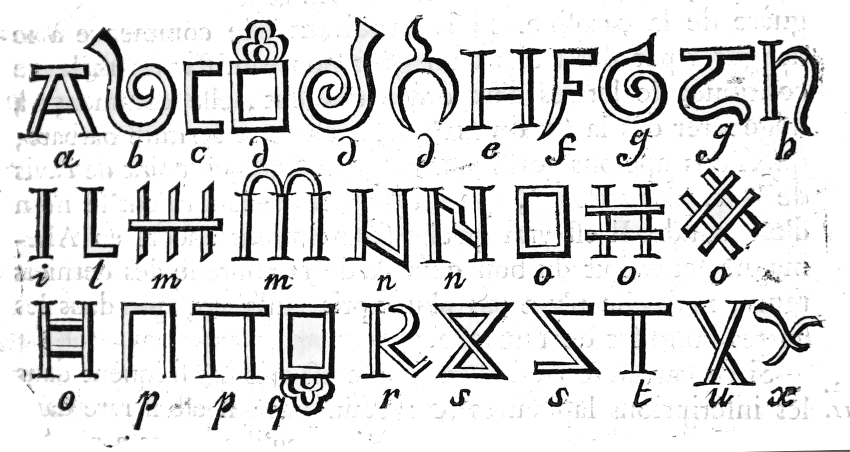 lettres utilisées dans le manuscript de la cathédrale de Wirtzbourg enfermant les épitre de Paul. Présenté dans "nouveau traité de diplomatique".